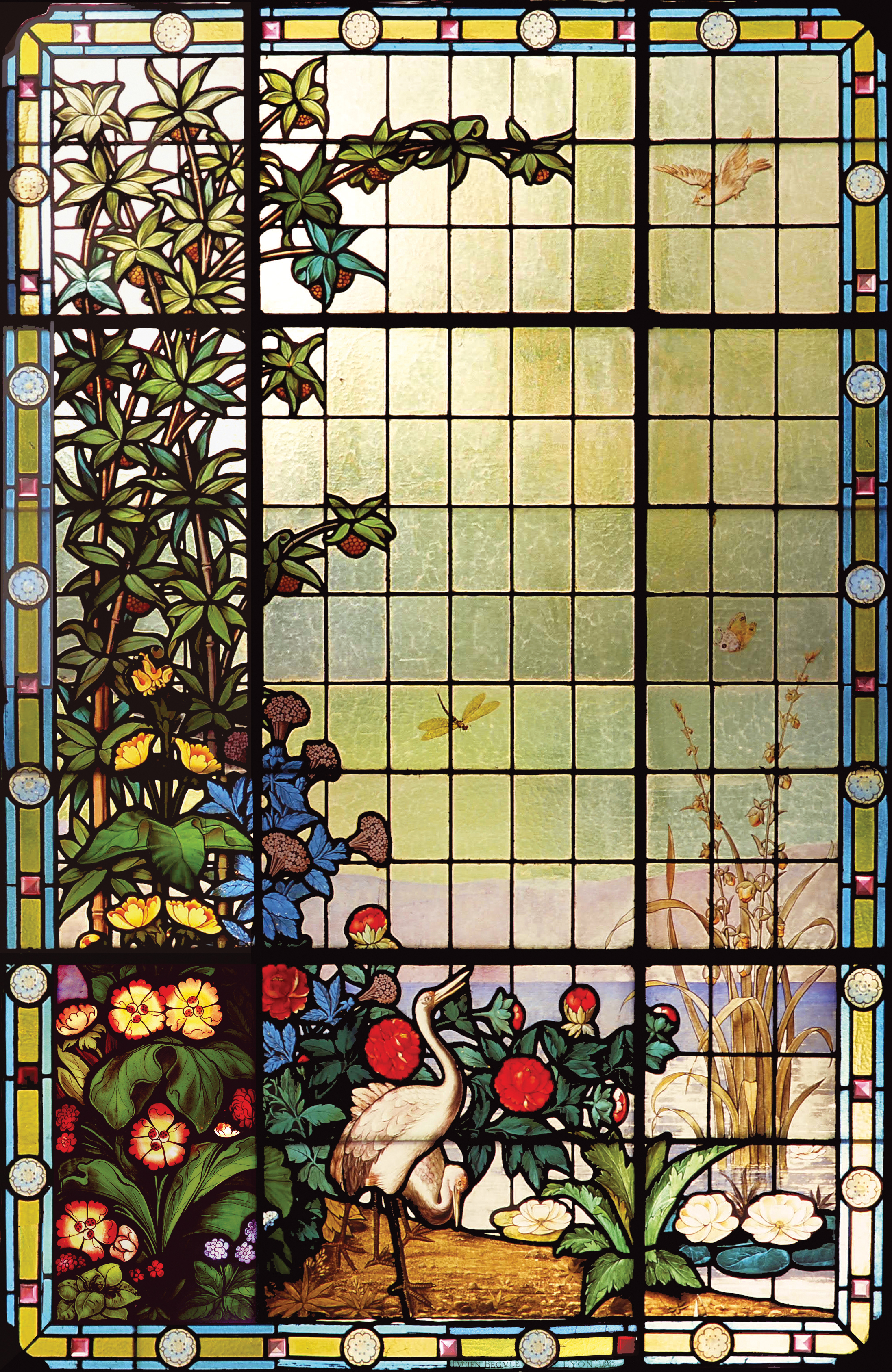 Hérons, oiseaux, libellules et papillons sur les bords du lac Léman